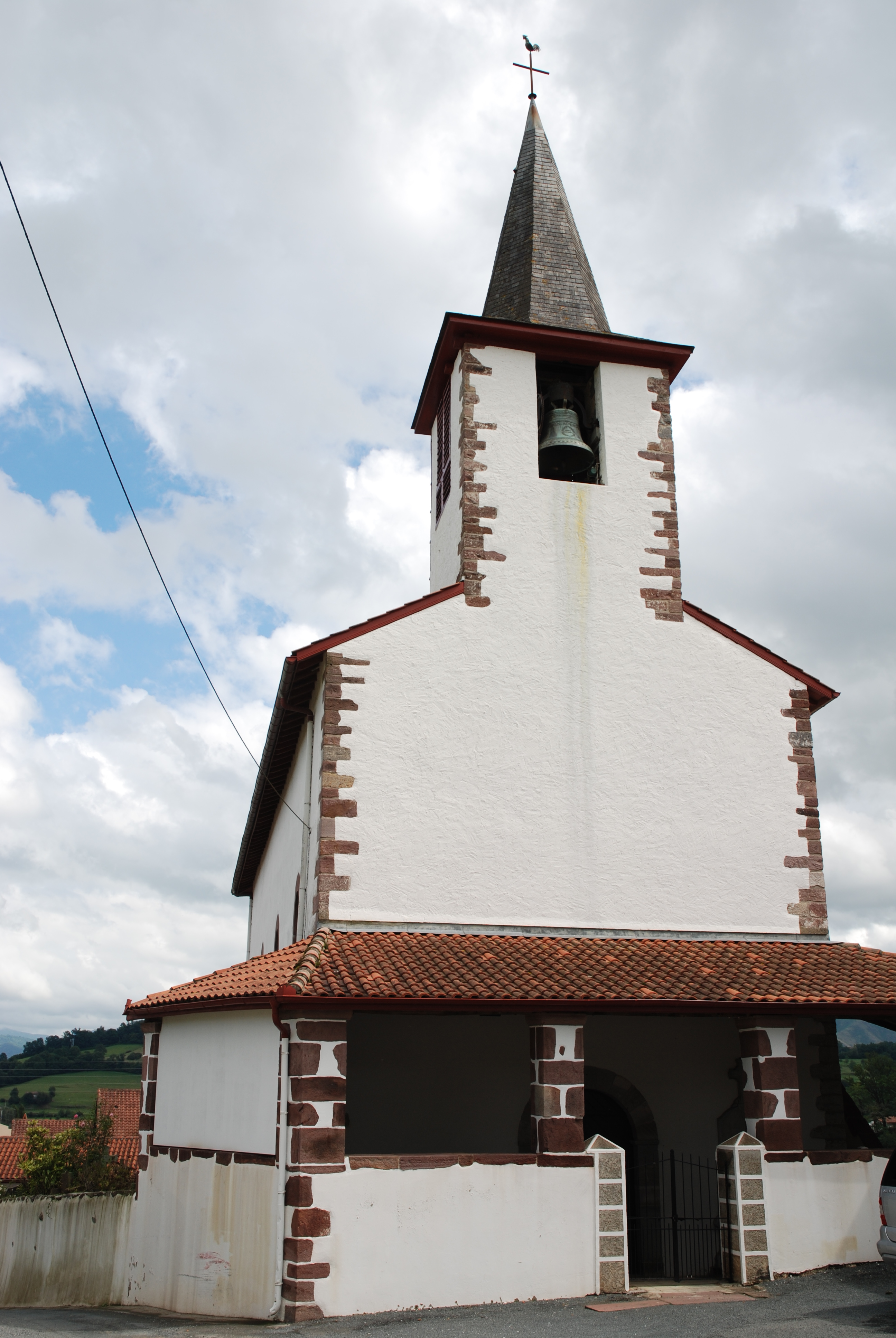 Lasse, l'église Saint-Martin